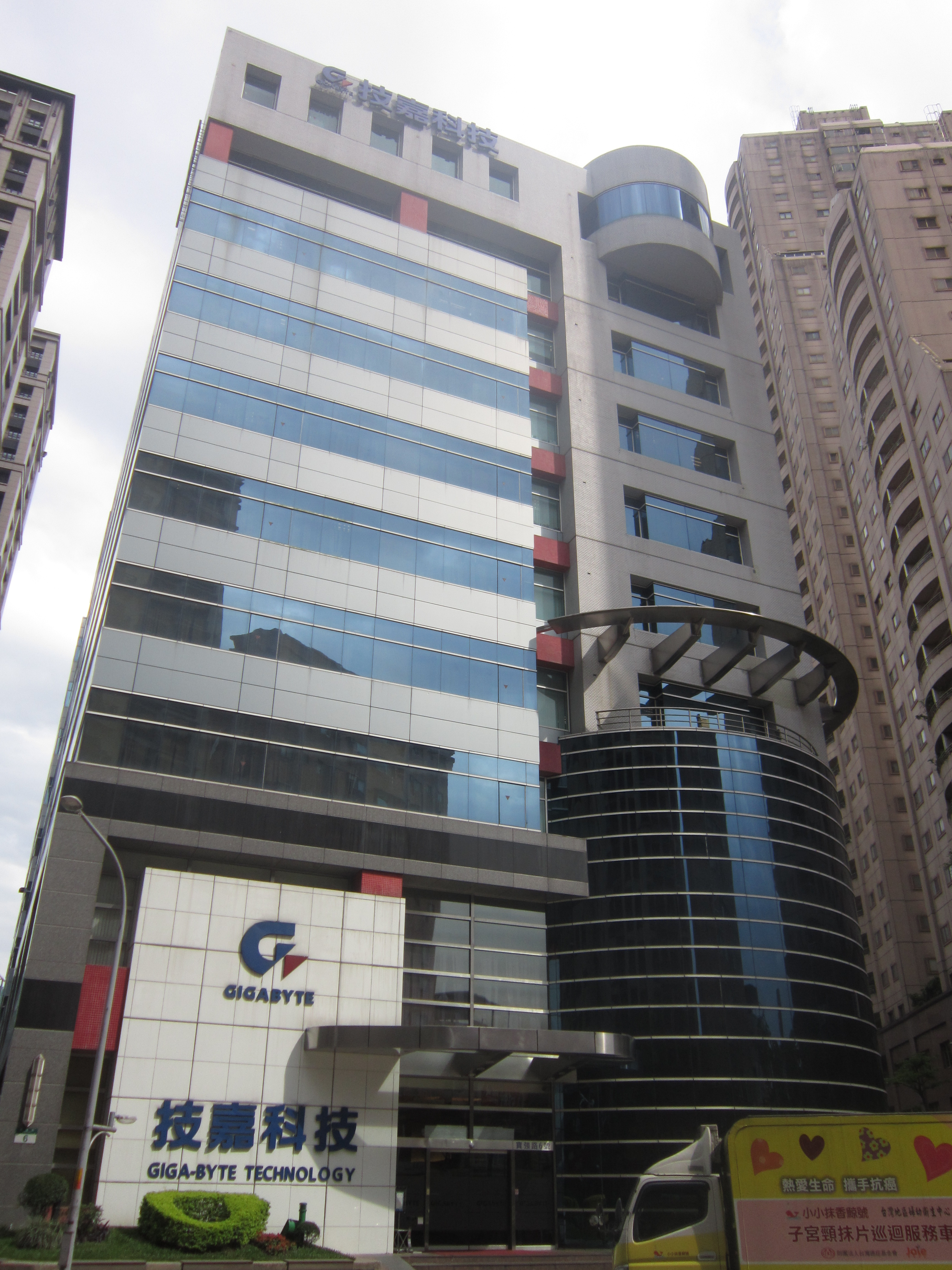 中文（台灣）: 技嘉科技總部，位於新北市新店區寶強路6號。